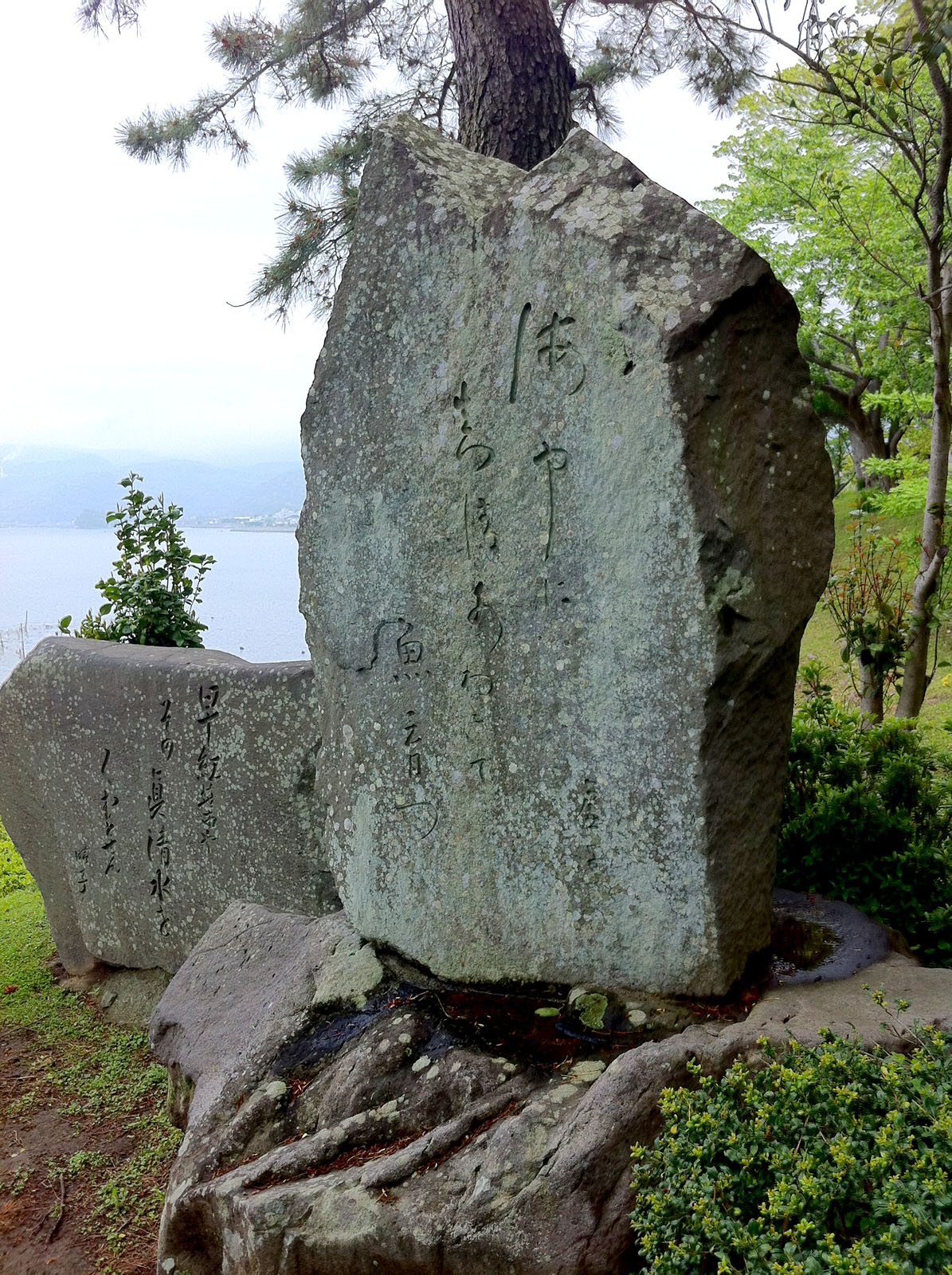 城下海岸に立つ高浜虚子句碑（大分県速見郡日出町）